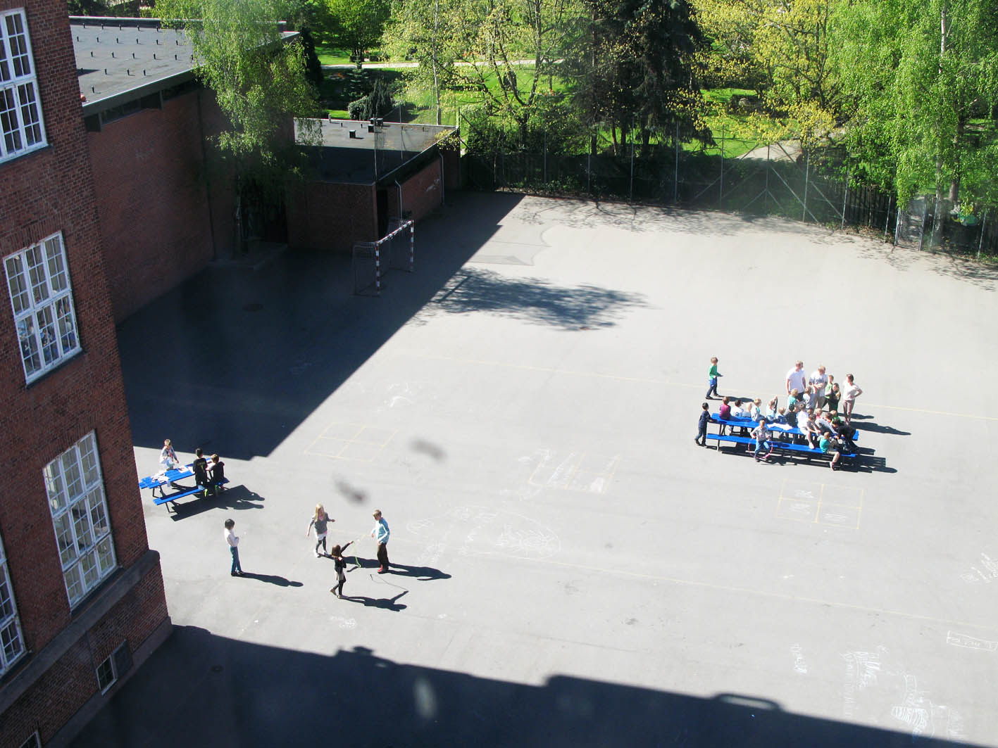 Foto taget af Institut Sankt Joseph